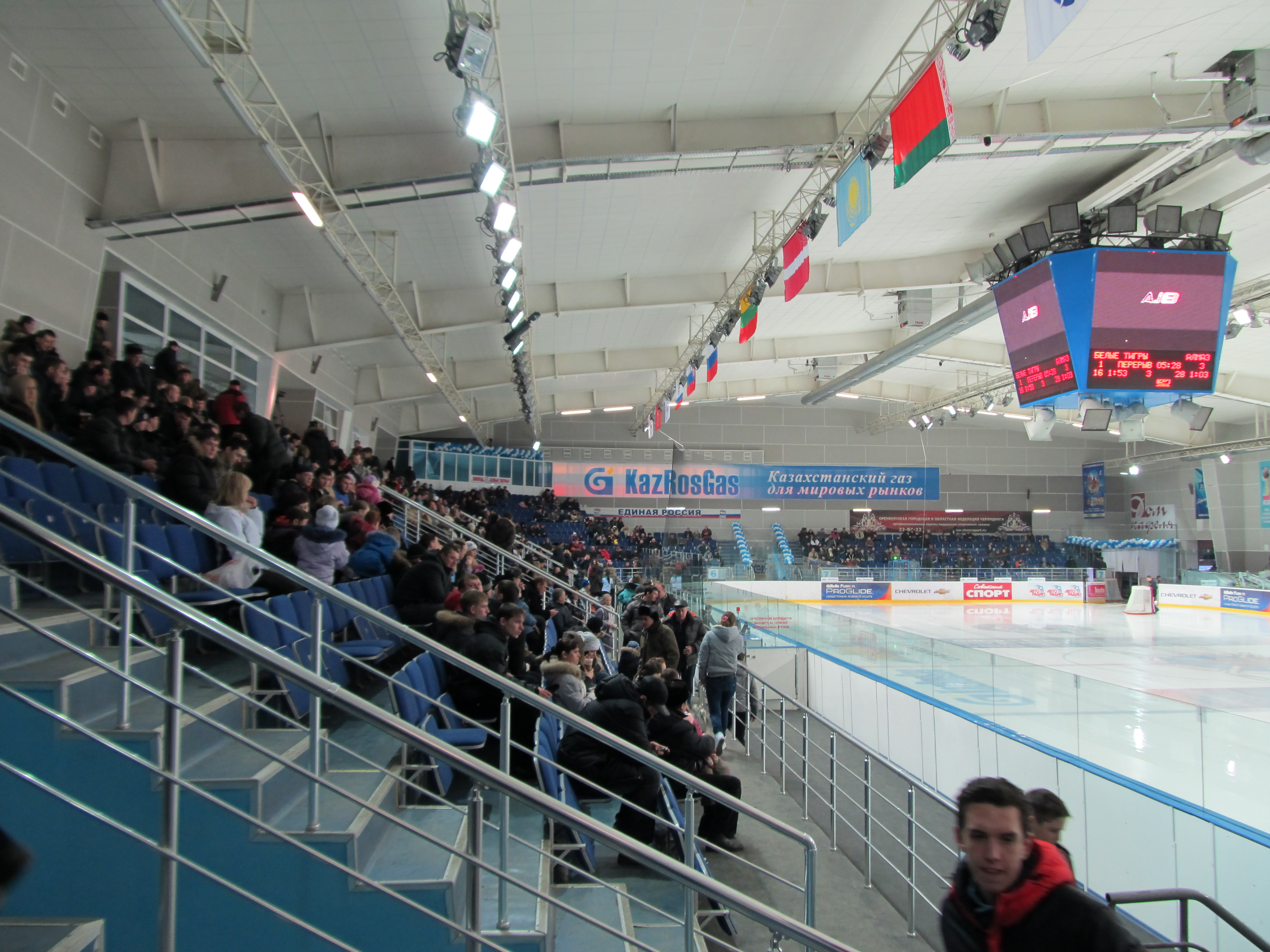 Ледовый дворец Звездный Трибуны